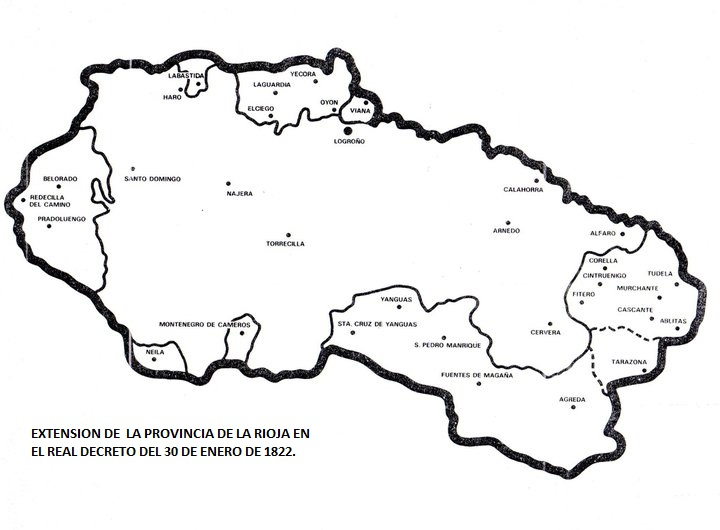 Provincia de La Rioja tal y como aparece en el real decreto del 30 de Enero de 1822. Finalmente constituida con el nombre de su capital, Logroño.